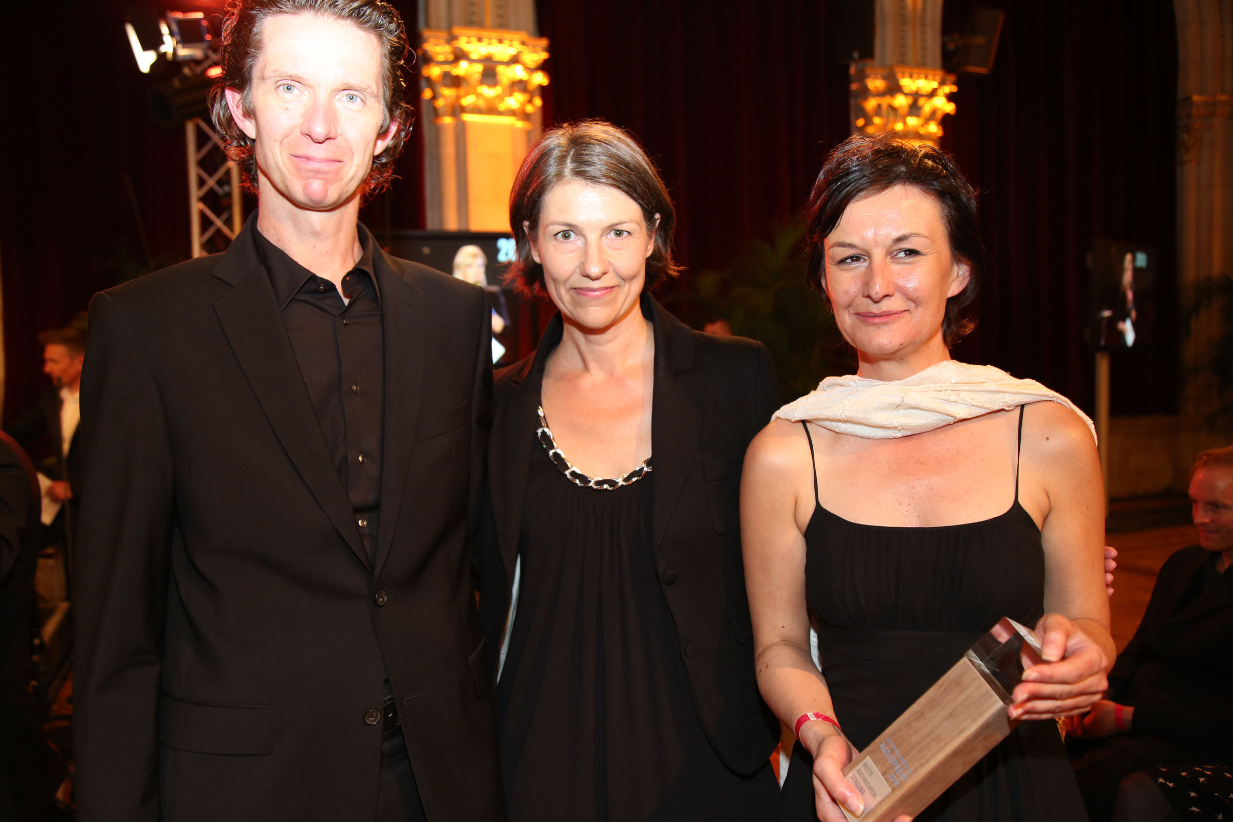 14-ö1-Mittagsjournal-5492